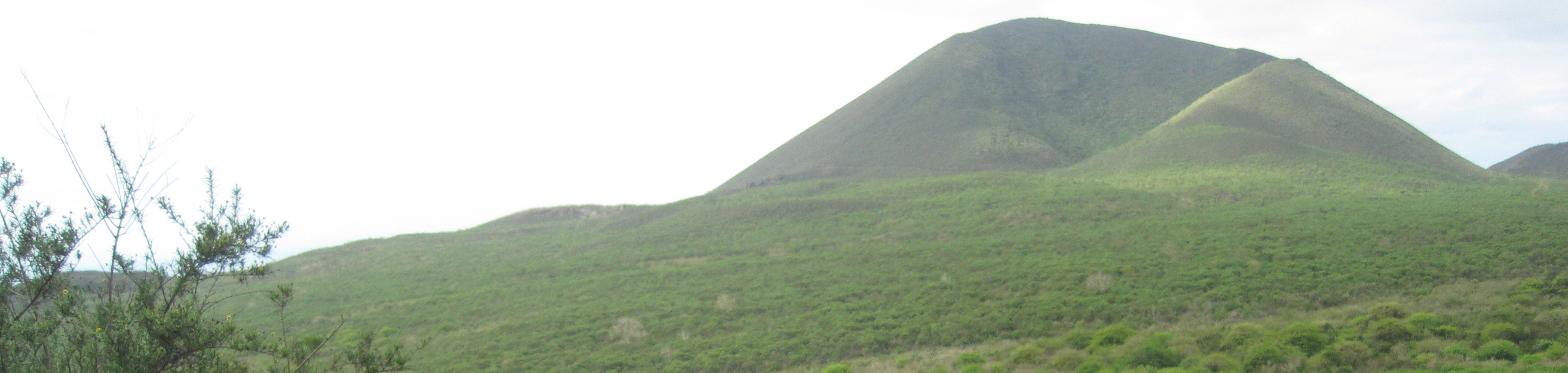 Cerro Pajas volcano, Floreana island, Galapagos